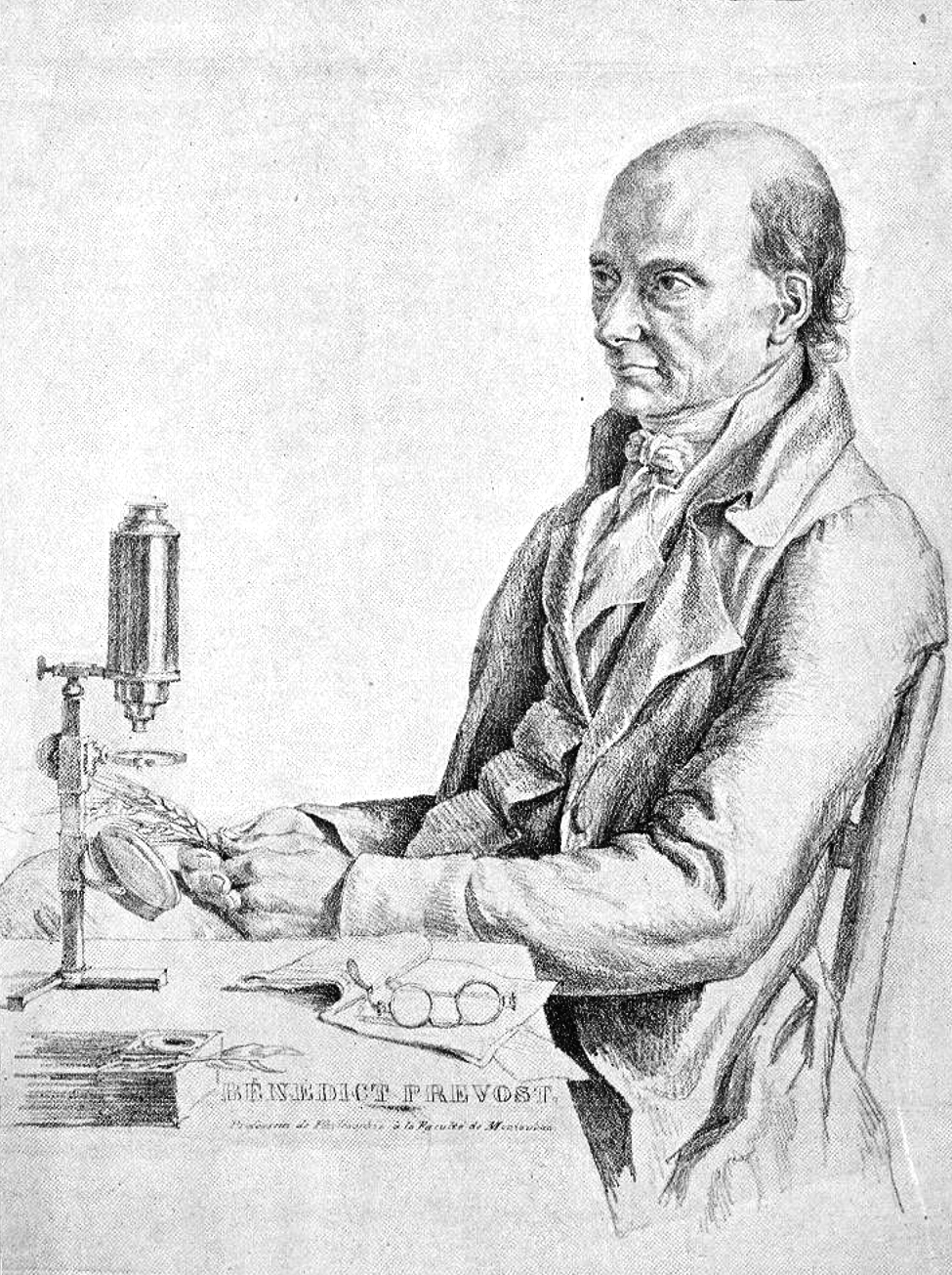 Isaac-Bénédict Prévost